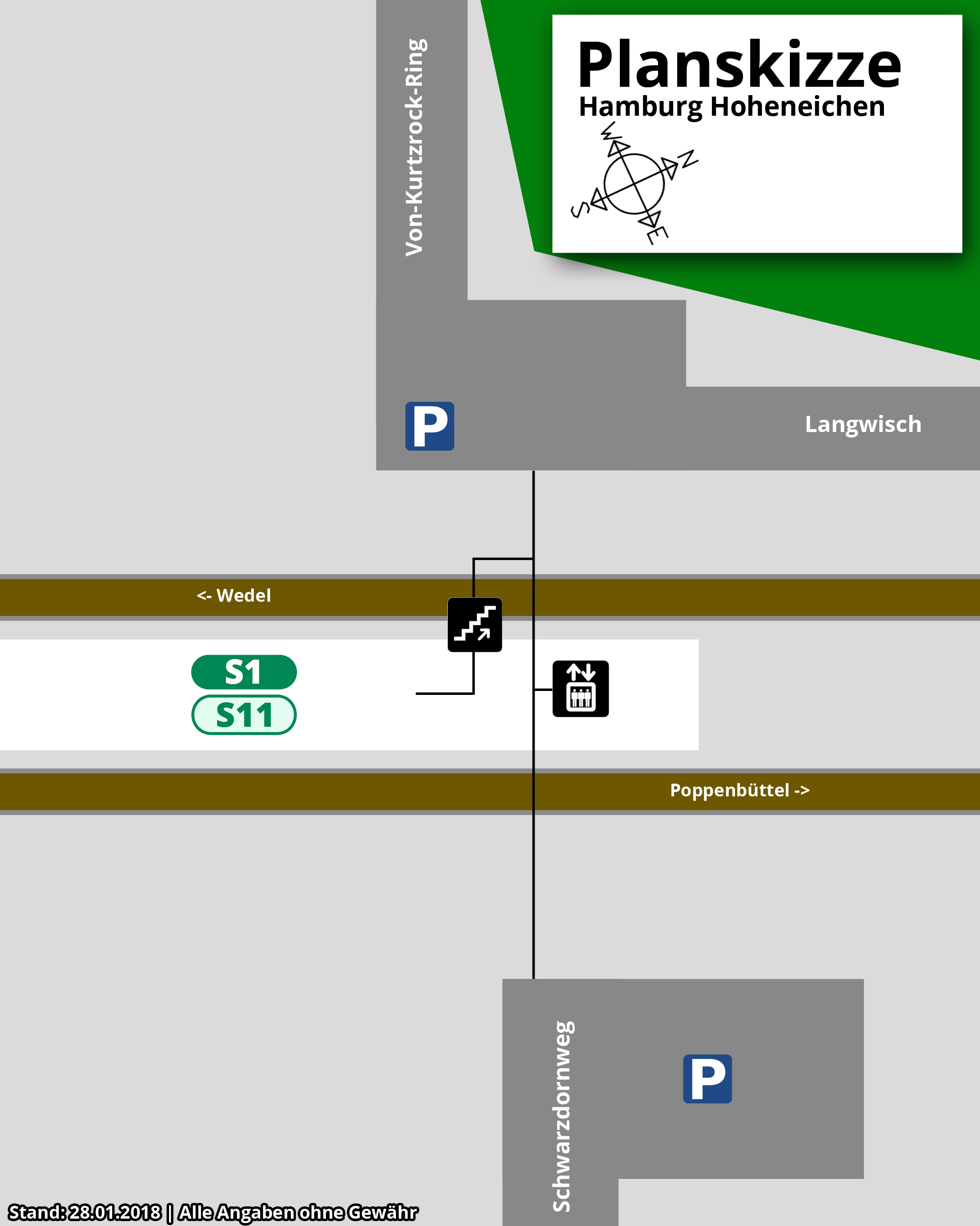 Planskizze für den Bahnhof Hamburg-Hoheneichen